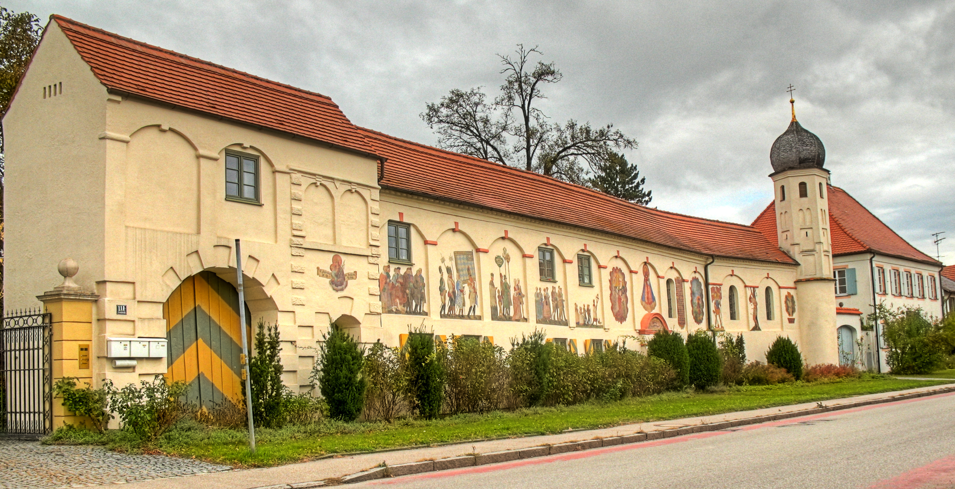 Deutschland, Bayern, Landkreis Fürstenfeldbruck, Olching, Ortsteil Esting, Estinger Schlosskapelle, tonemapped HDR-Aufnahme